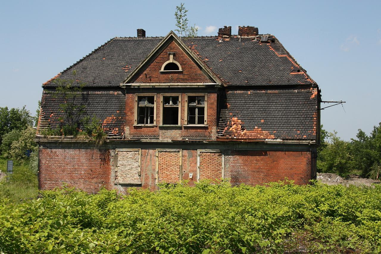 Pusty budynek działu ekspedycji.